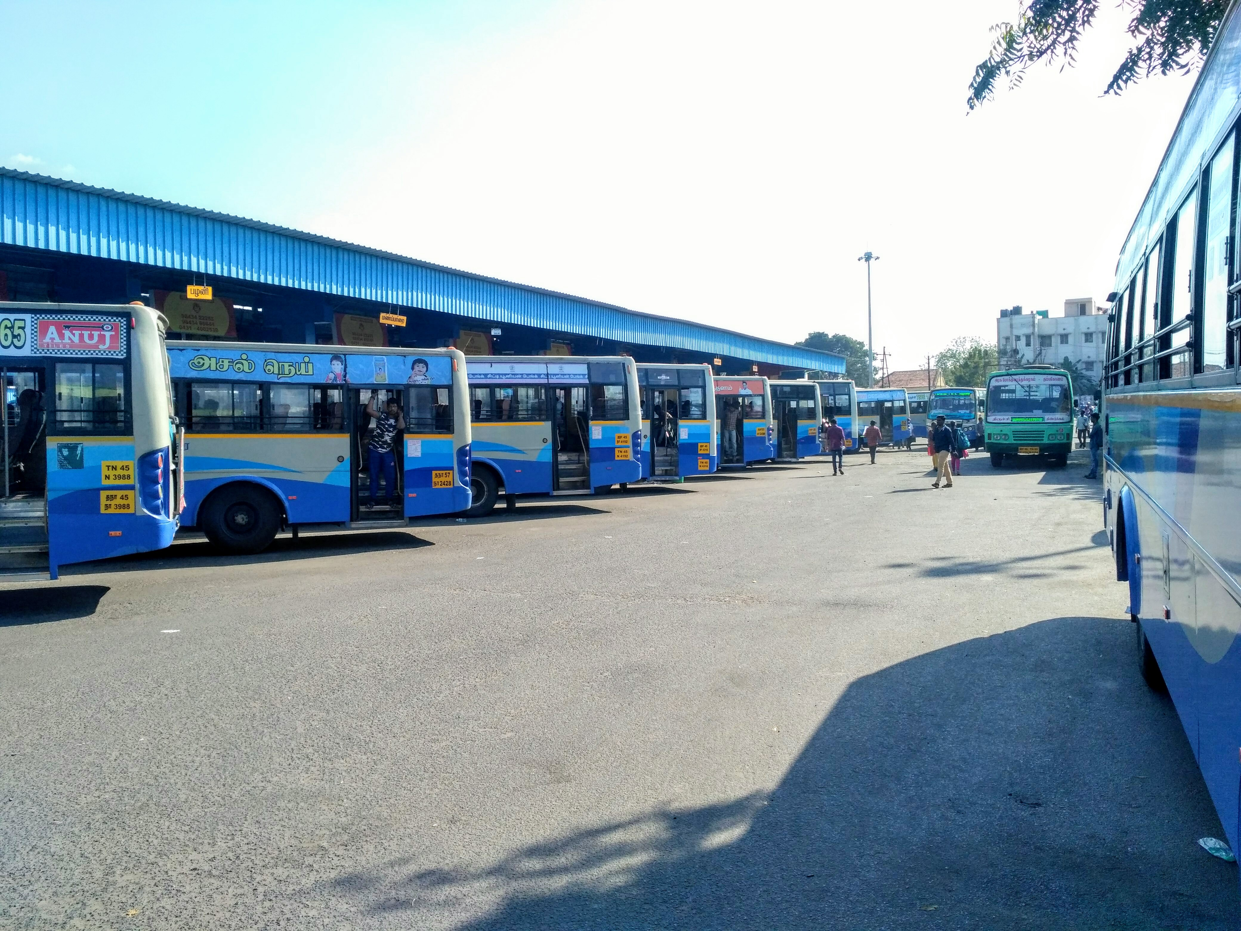 திருச்சி மத்திய பேருந்து நிலையத்தின் உள்கட்டமைப்பு.